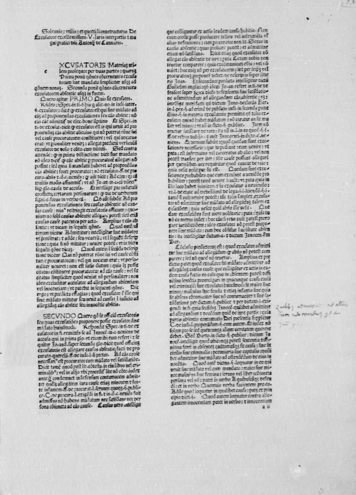 Carta a2r